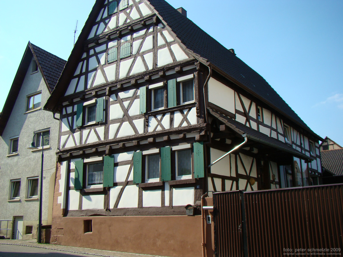 Historisches Fachwerkhaus in Richen, Hintere Gasse 41